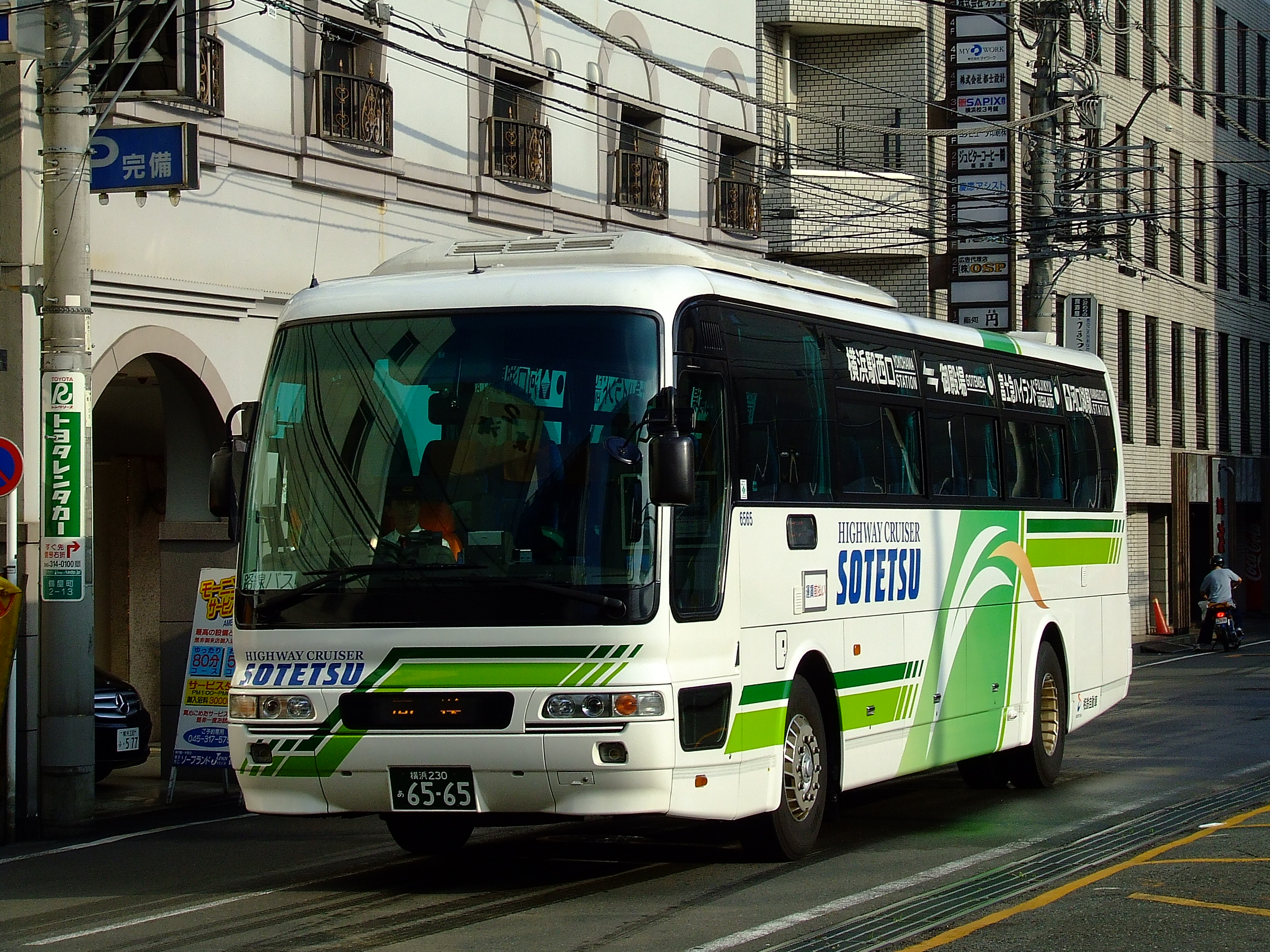 相鉄自動車の高速バス「レイクライナー」横浜相鉄バスセンター付近にて